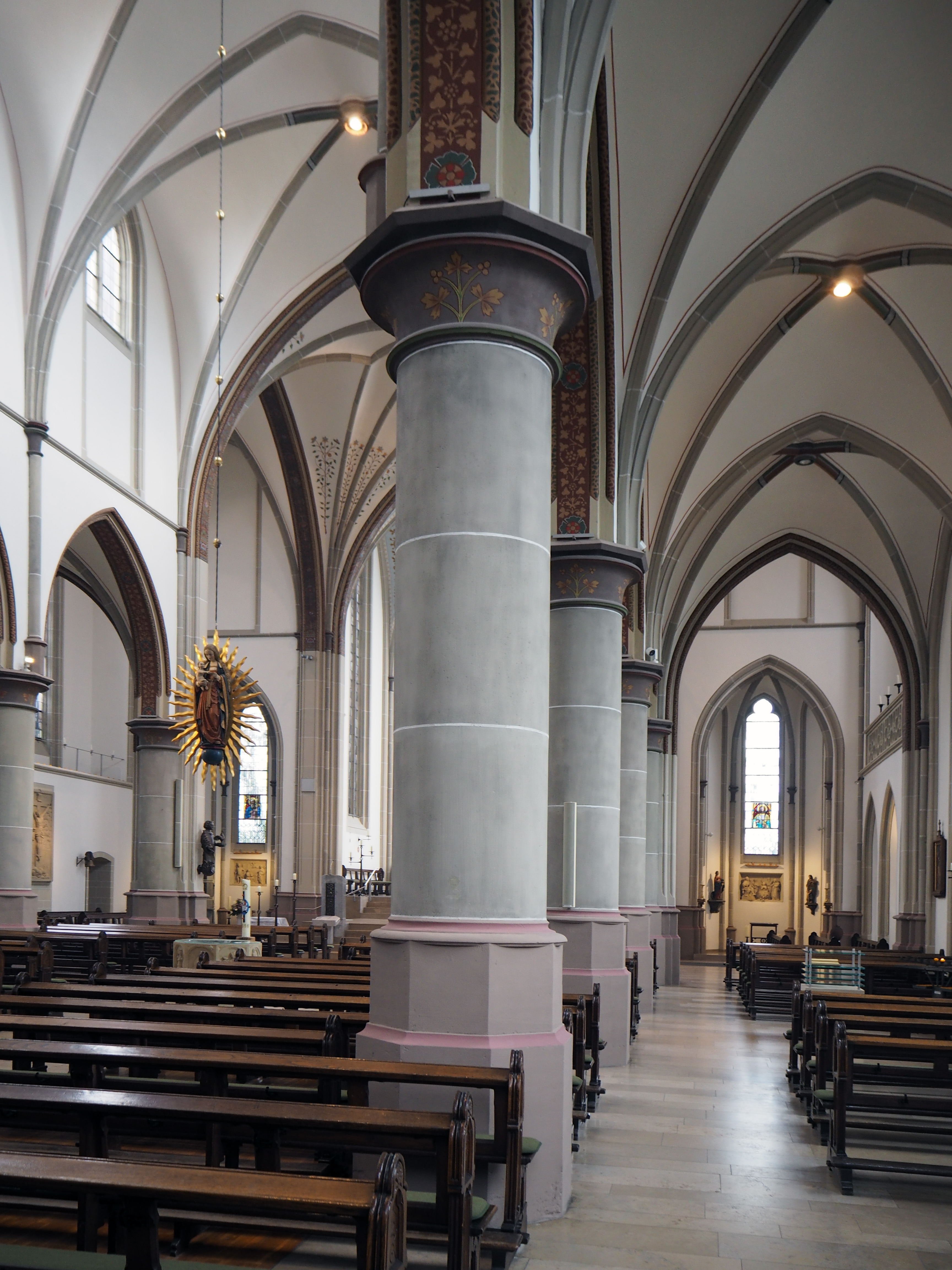 Olfen (NRW), St. Vitus, Innenraum nach Osten , Foto: April 2017